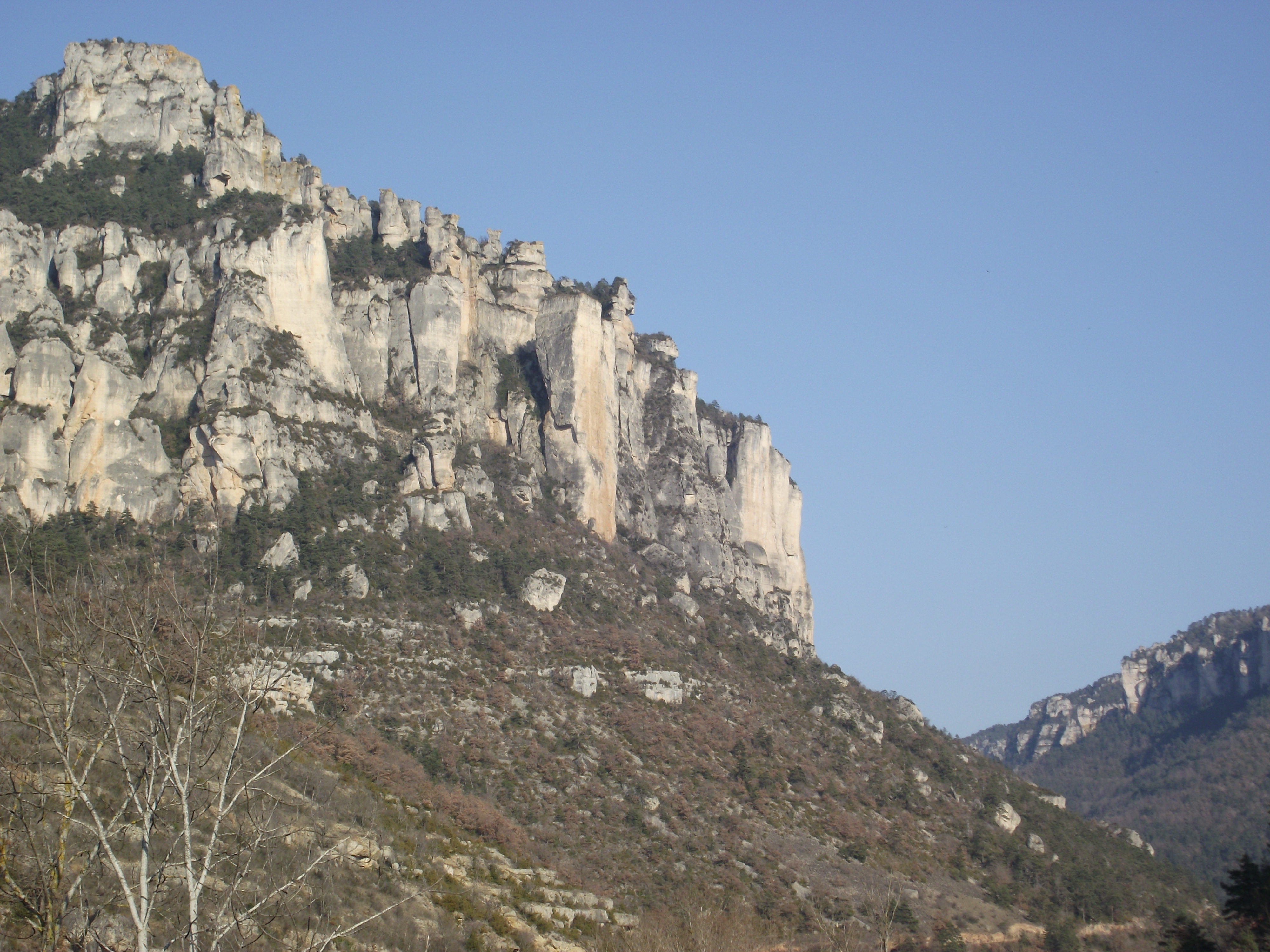 Rochers calcaires surplombant les gorges de la Jonte au Rozier (Lozère)